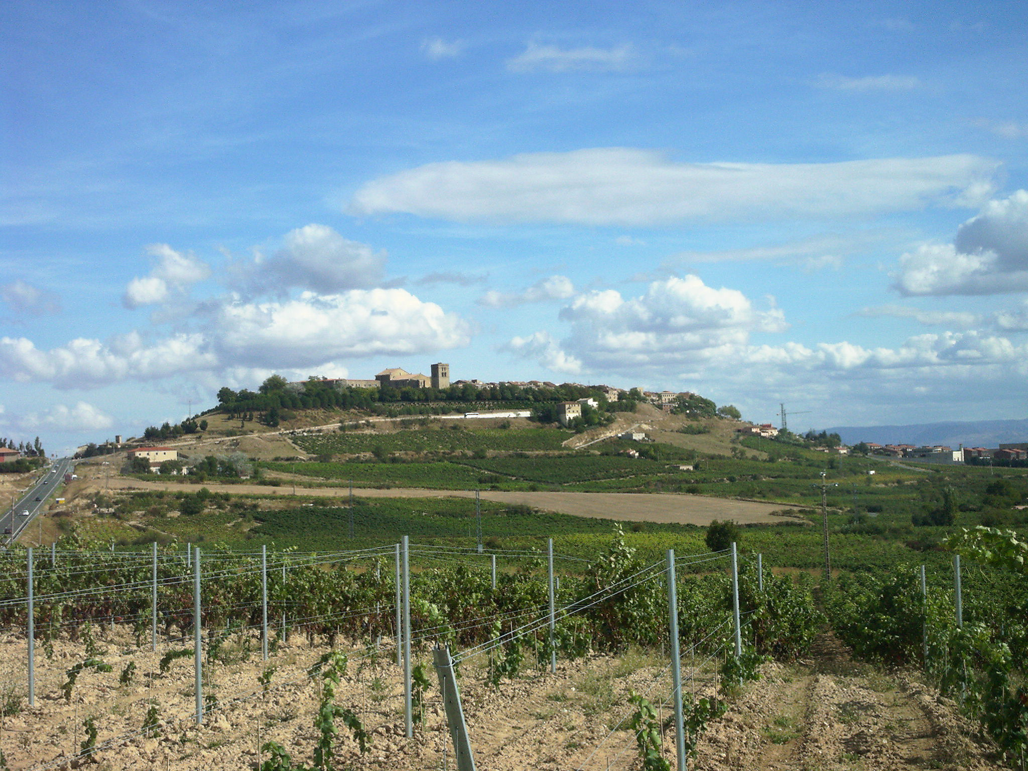 Guardiako profila iparraldetik ikusia